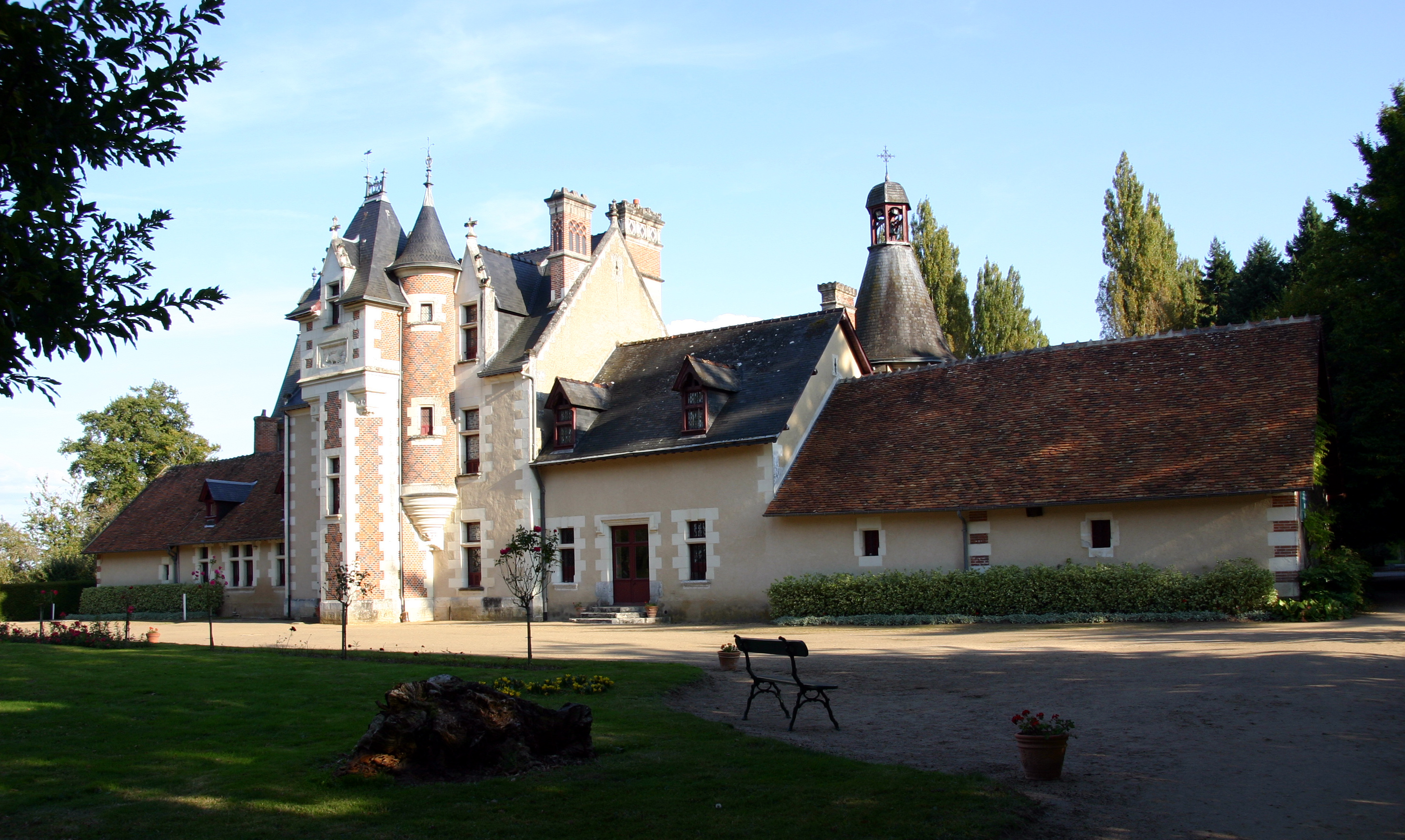 Schloss Troussay